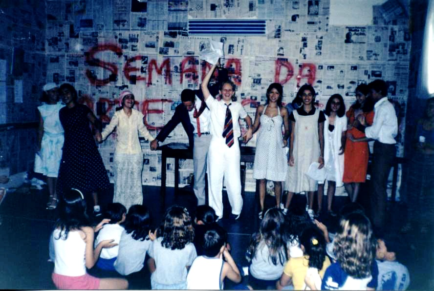 Grupo juvenil de teatro e cinema experimentais de Três Lagoas. 1998.